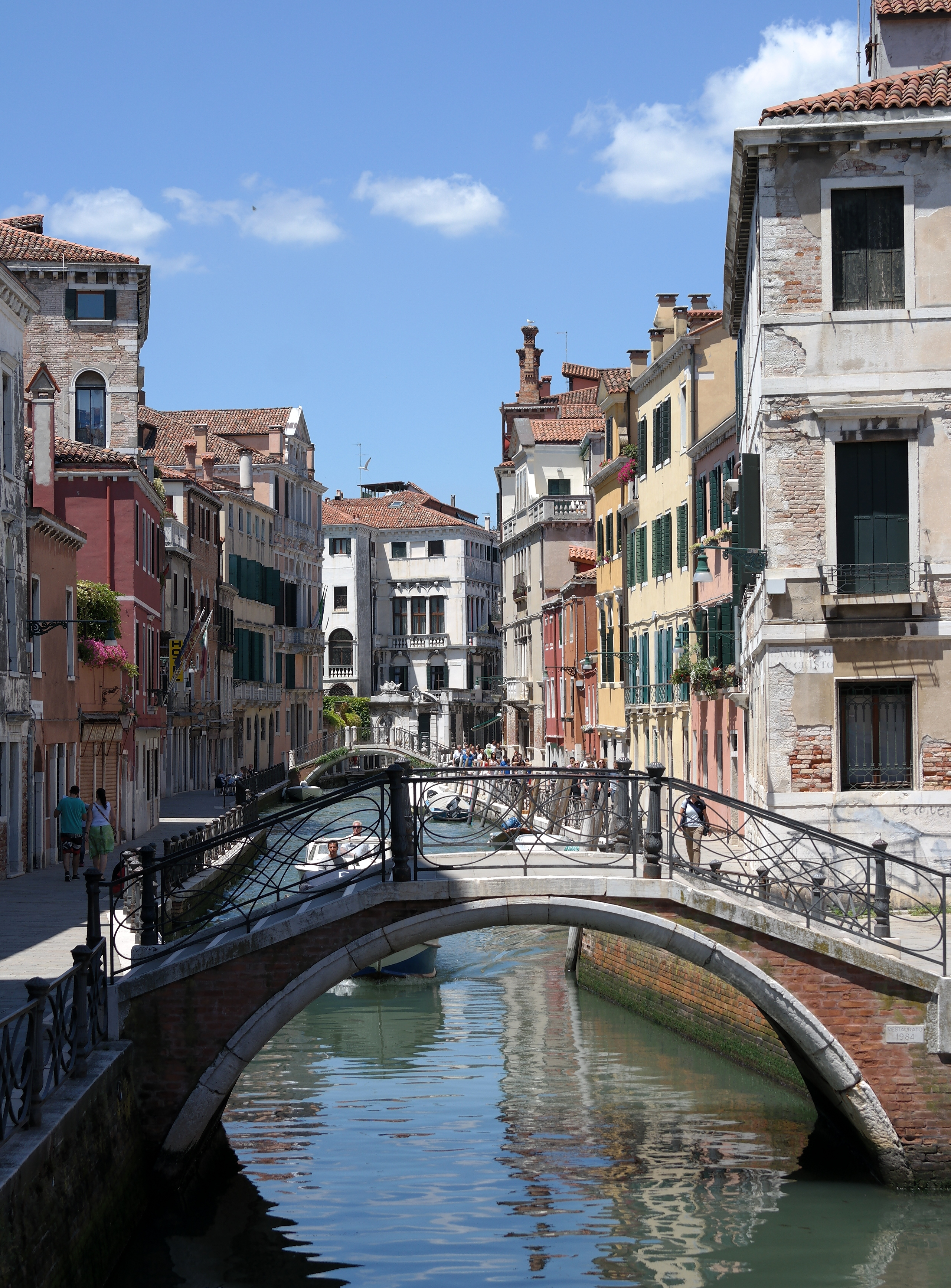 Rio Marin, nel sestiere di Santa Croce, a Venezia